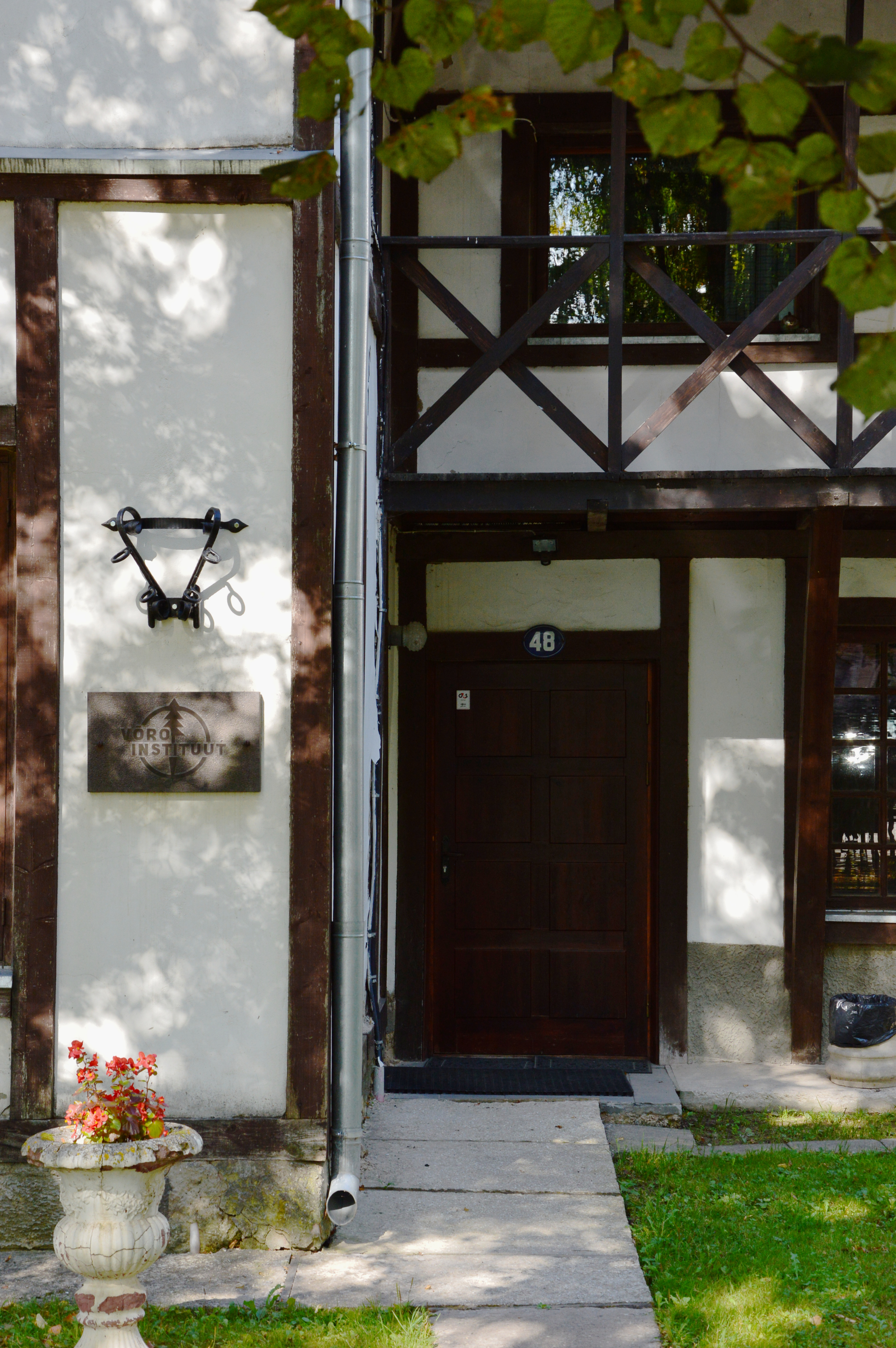 Võru Instituudi sissepääs